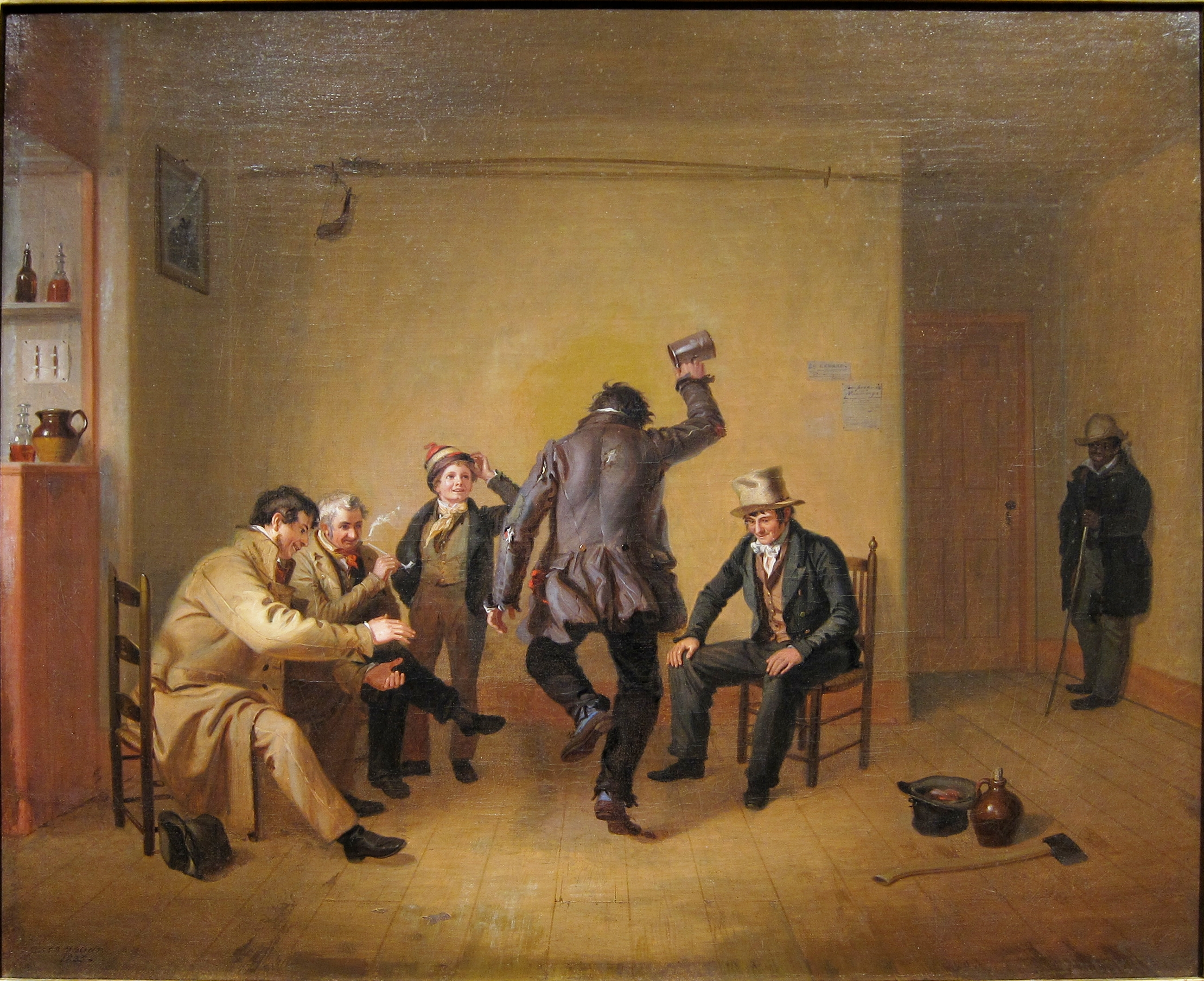 Bar-room Scene à l'Art Institute of Chicago.